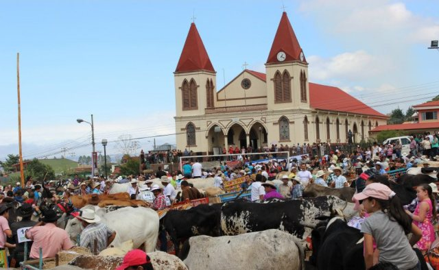 Celebración del día nacional del boyero costarricense 2013 en San Antonio de Escazú, Costa Rica.